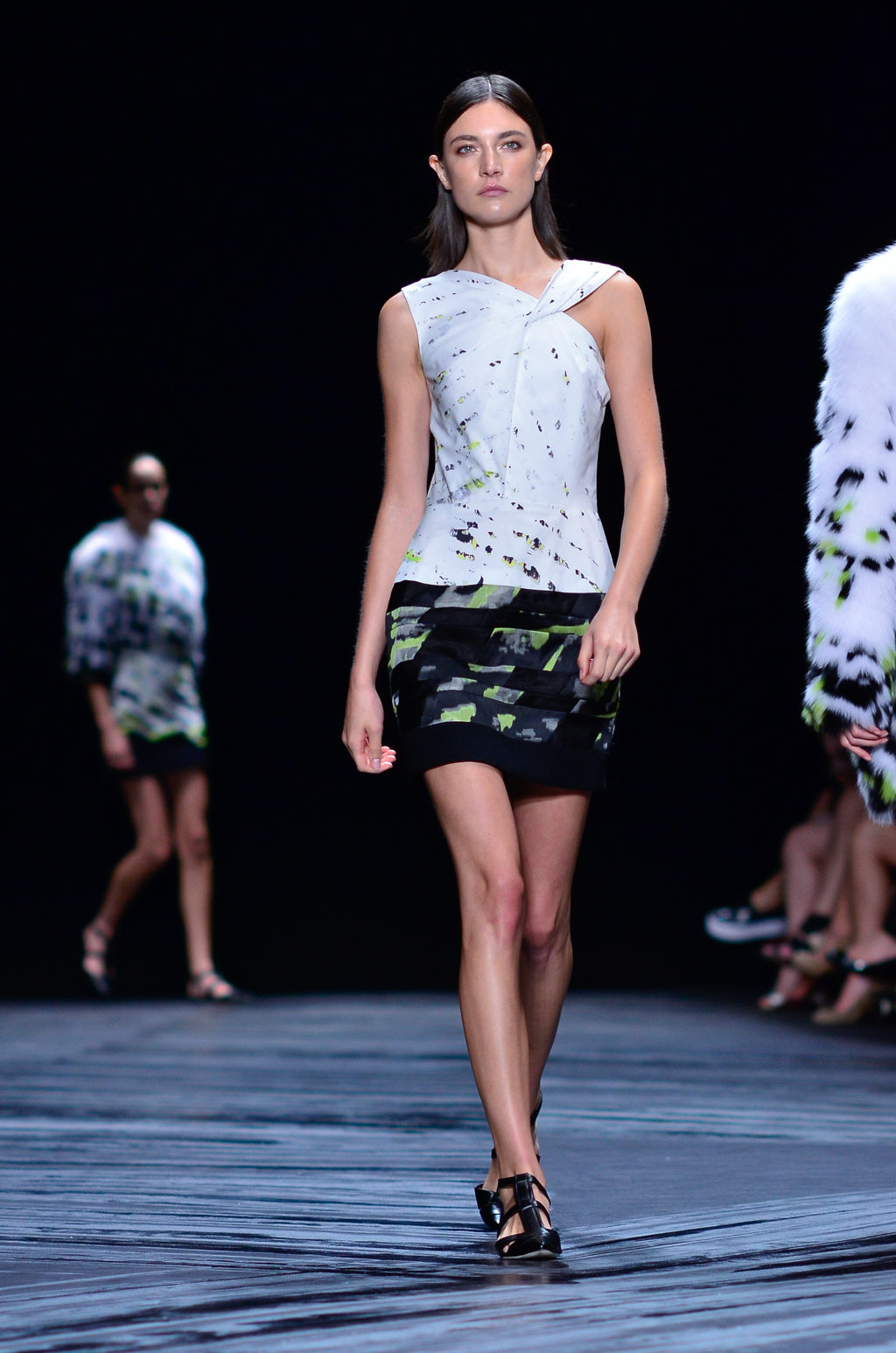 Jacquelyn Jablonski défilant pour J. Mendel